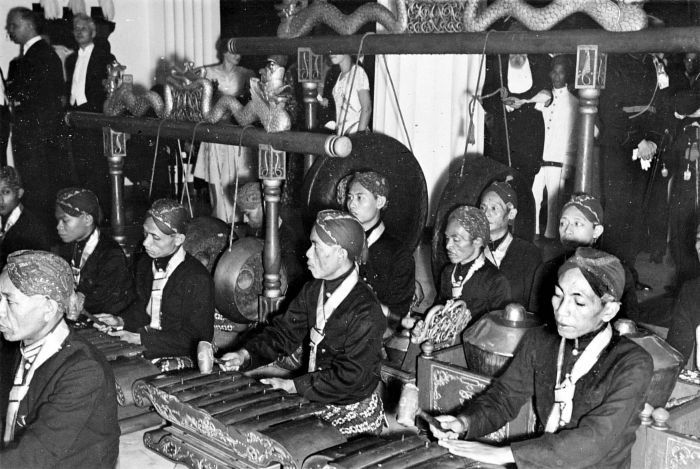 Repronegatief. Een Gamelan-orkest speelt ter gelegenheid van de installatie van de zoon van wijlen Paku Alam VII in de dalem, het verblijf van de vorst te Yogyakarta, Java